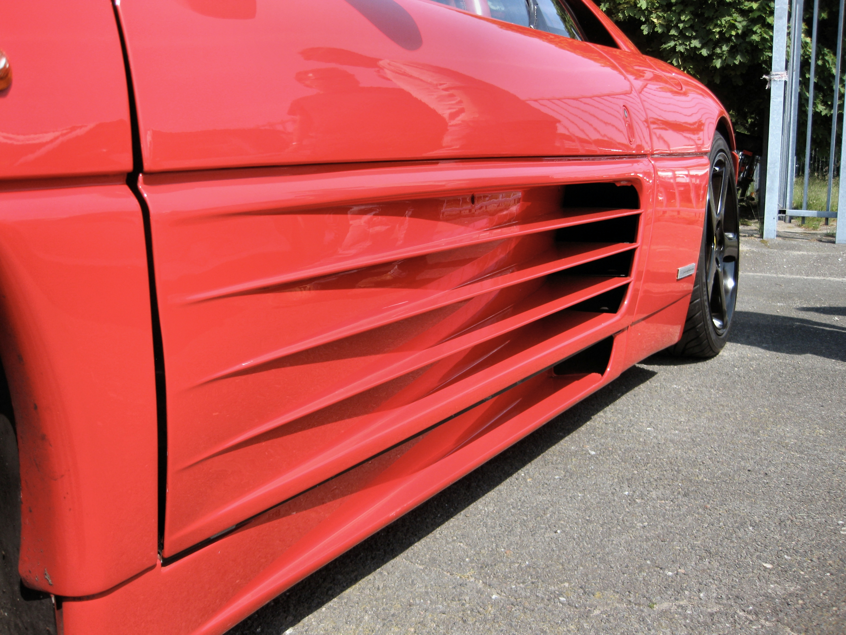 F348 - Nahaufnahme der Lufteinlässe